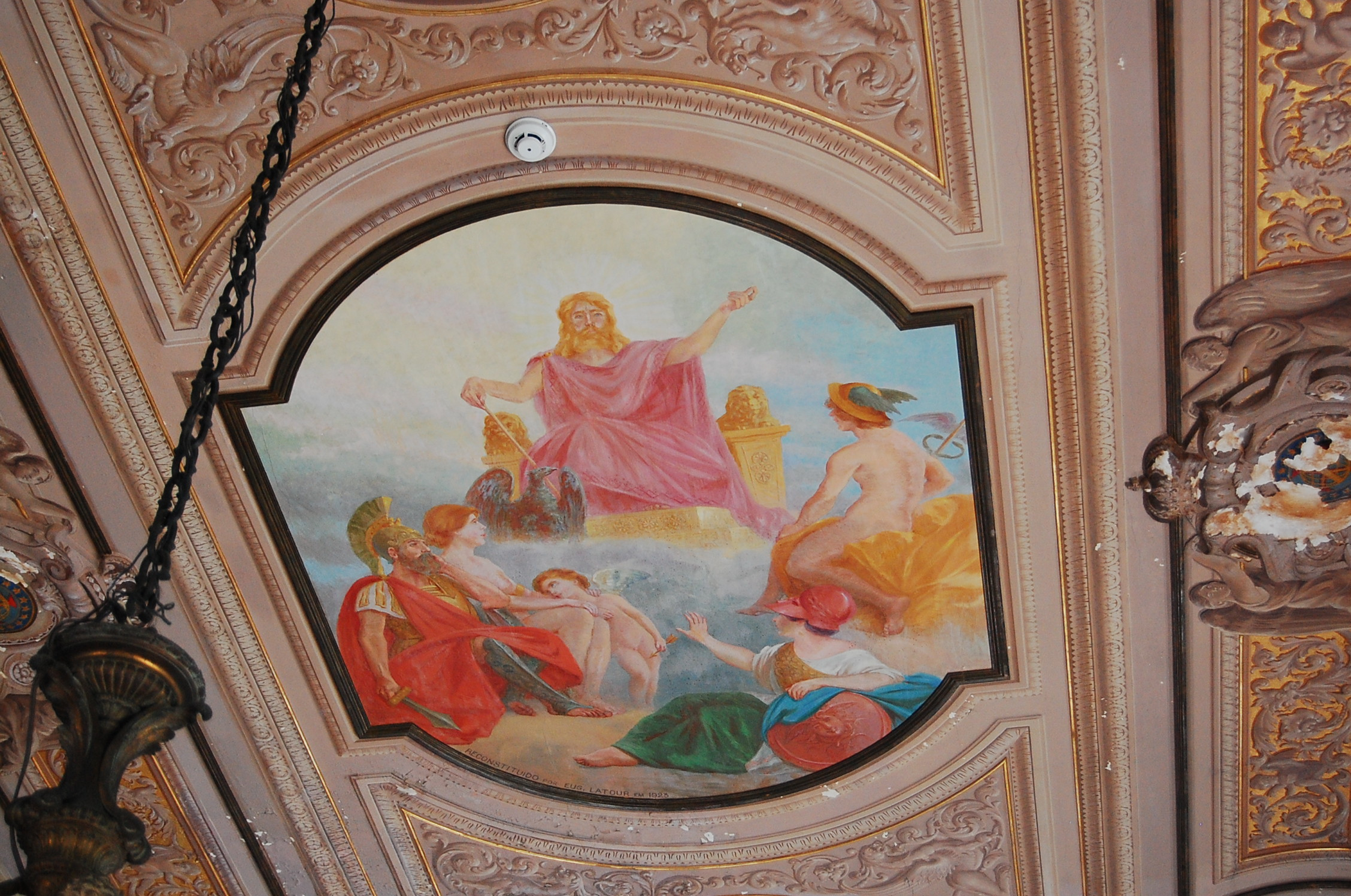 Museu Nacional, inclusive a Coleção Arqueológica Balbino de Freitas